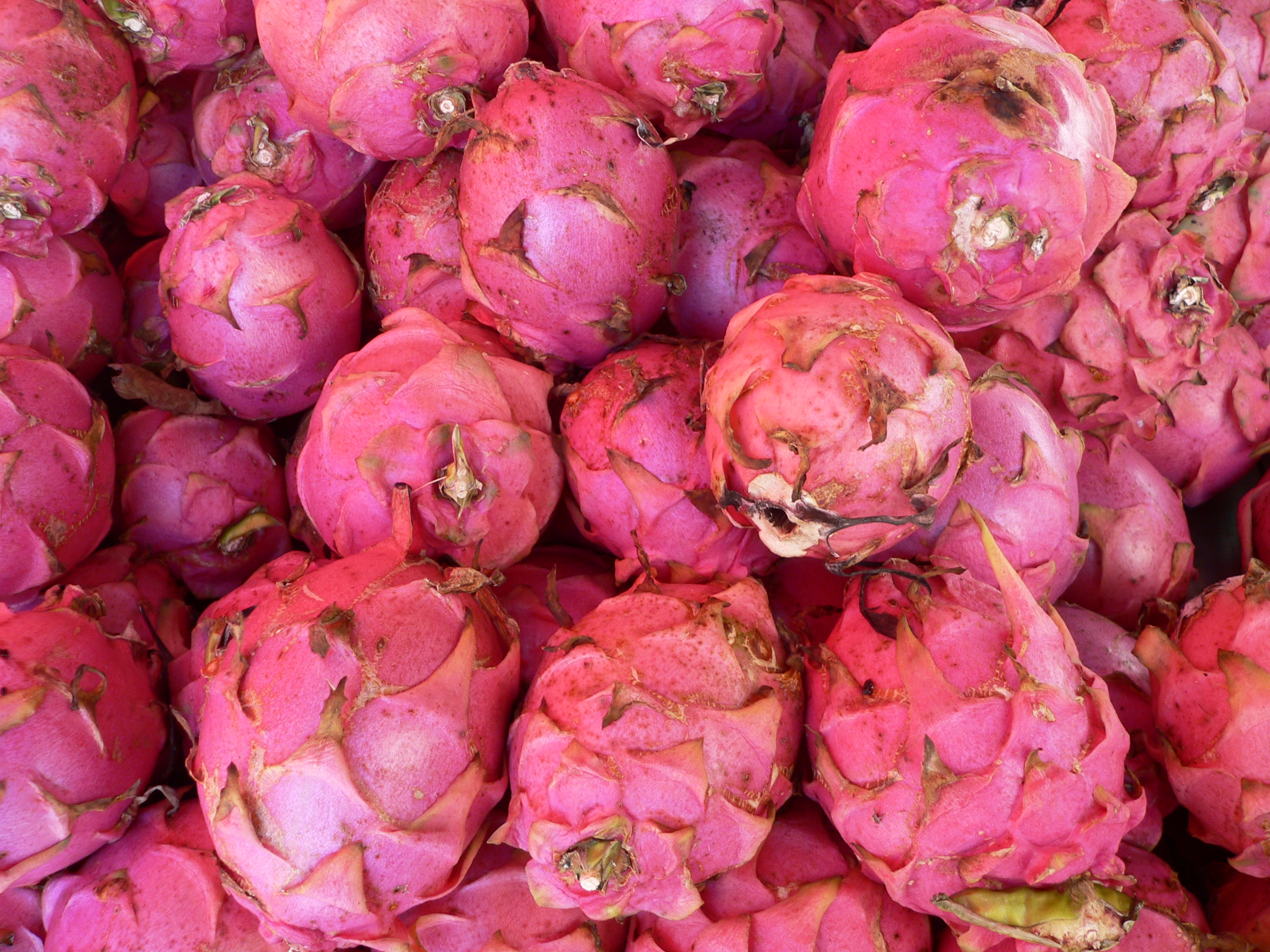 Pitaya